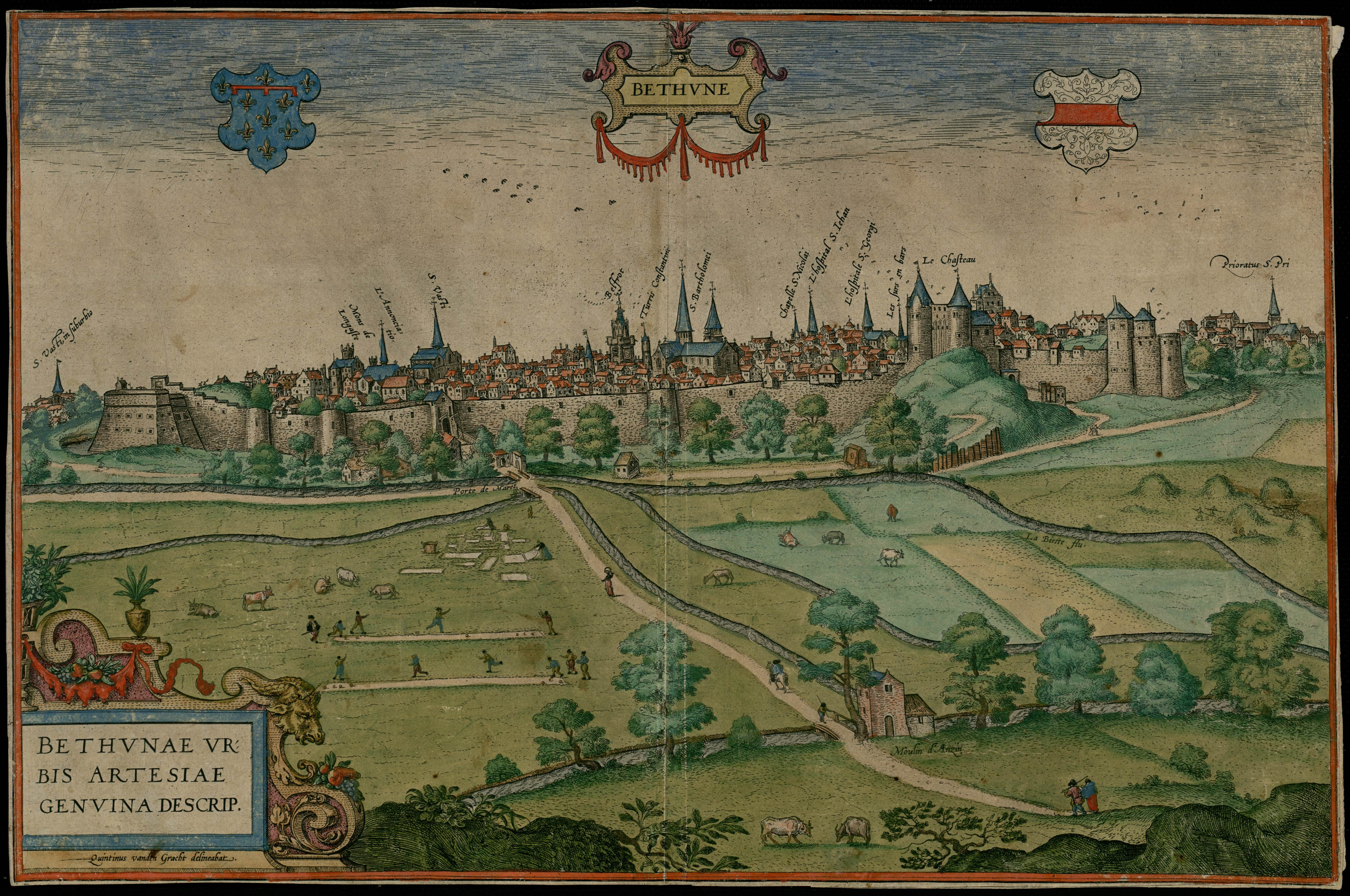 Carte ancienne de Béthune. Ref : 6 Fic 487.